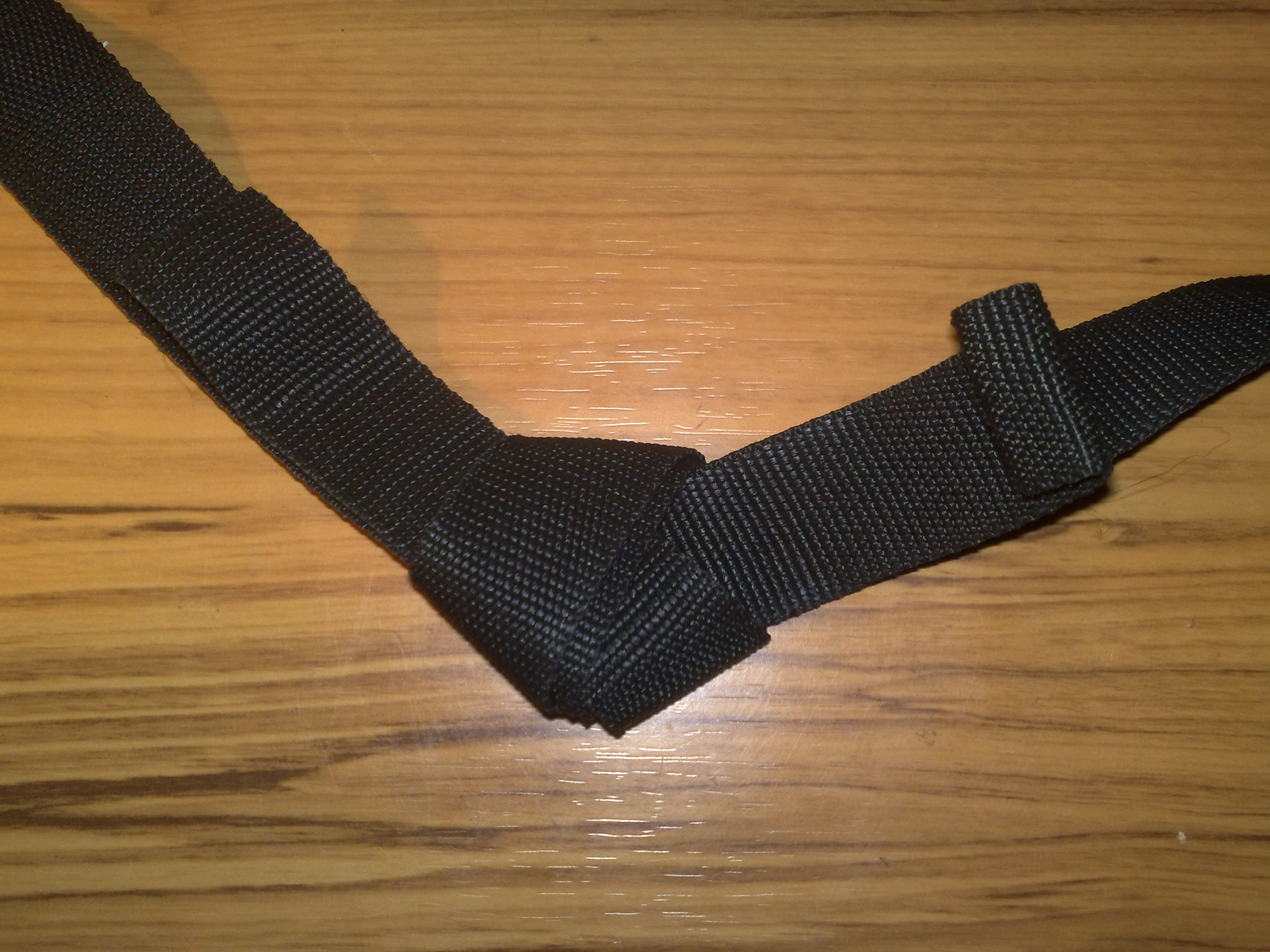 Узел "встречный проводник" связан и сфотографирован мной для статьи википедии.